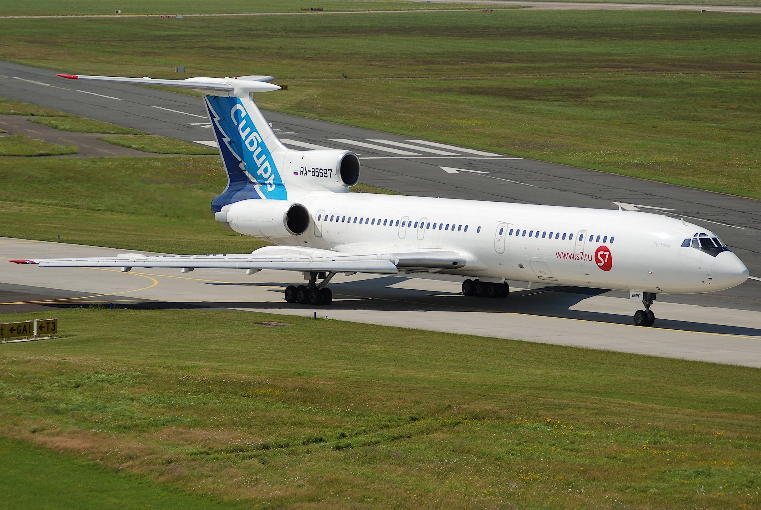 S7 Airlines Tupolev 154; RA-85697@HAJ;27.07.2007/481gu